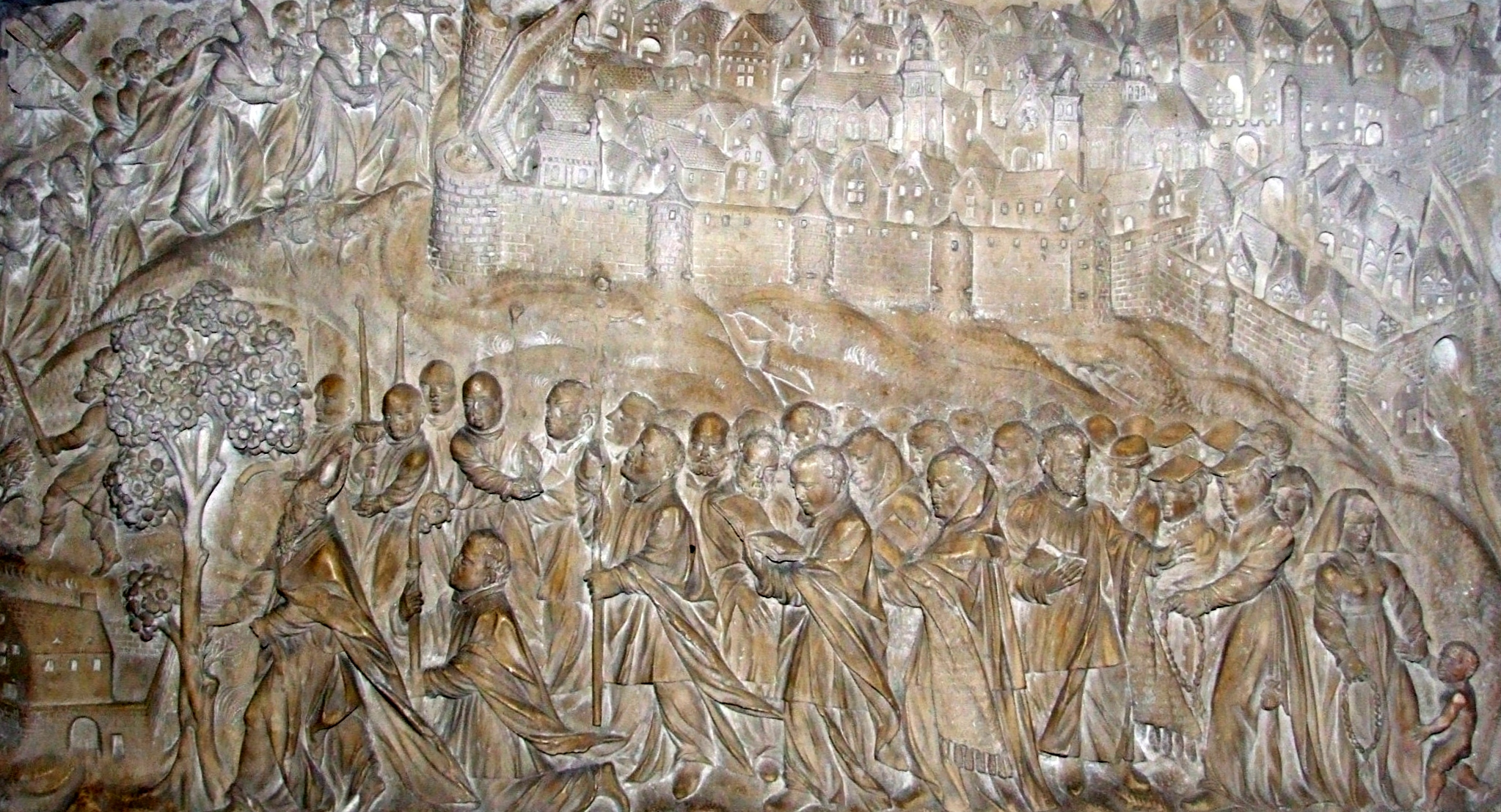 Cathédrale Saint-Mammès de Langres, FRANCE; bas-relief de la fin du XVIe siècle Procession.